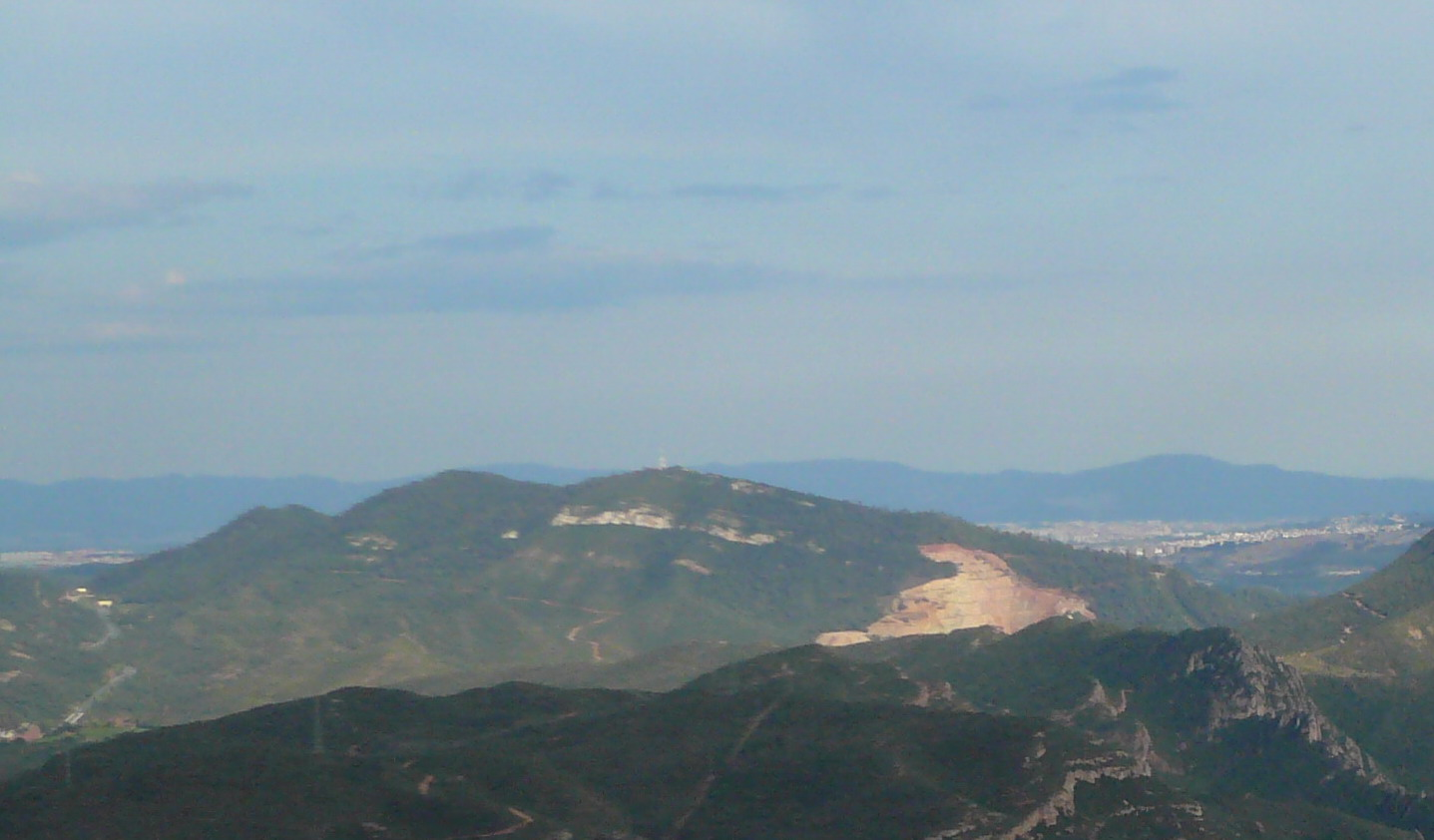 El turó del Ros (o Cap del Ros), al centre de la imatge, amb una antena al capdamunt, i bona part de la serra de Collcardús, de la que forma part. A la dreta de la serra s'hi veu la part superior de la pedrera del Mimó. Vist des del monestir de Montserrat.